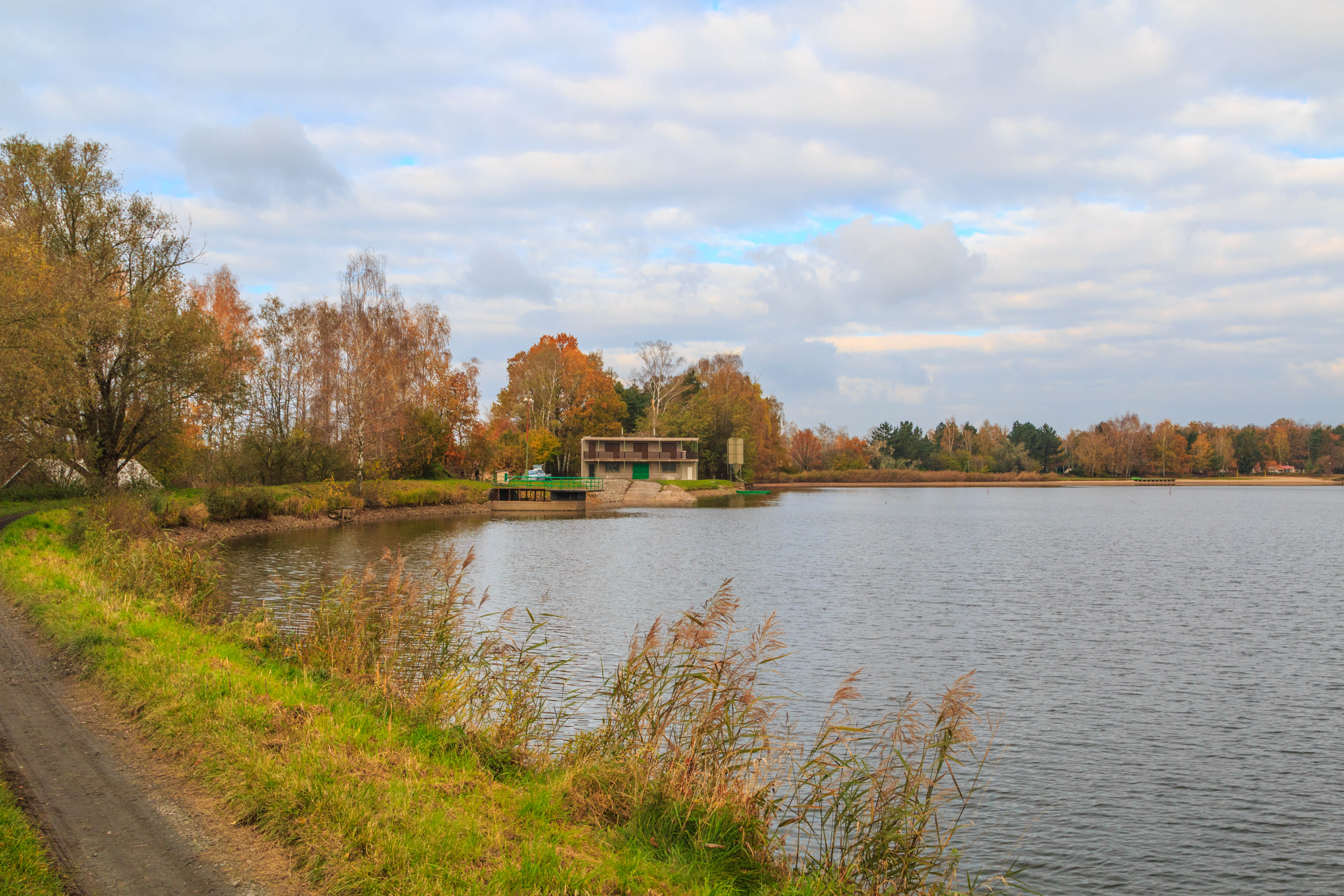 rybník Buňkov Project: Vodstvo.